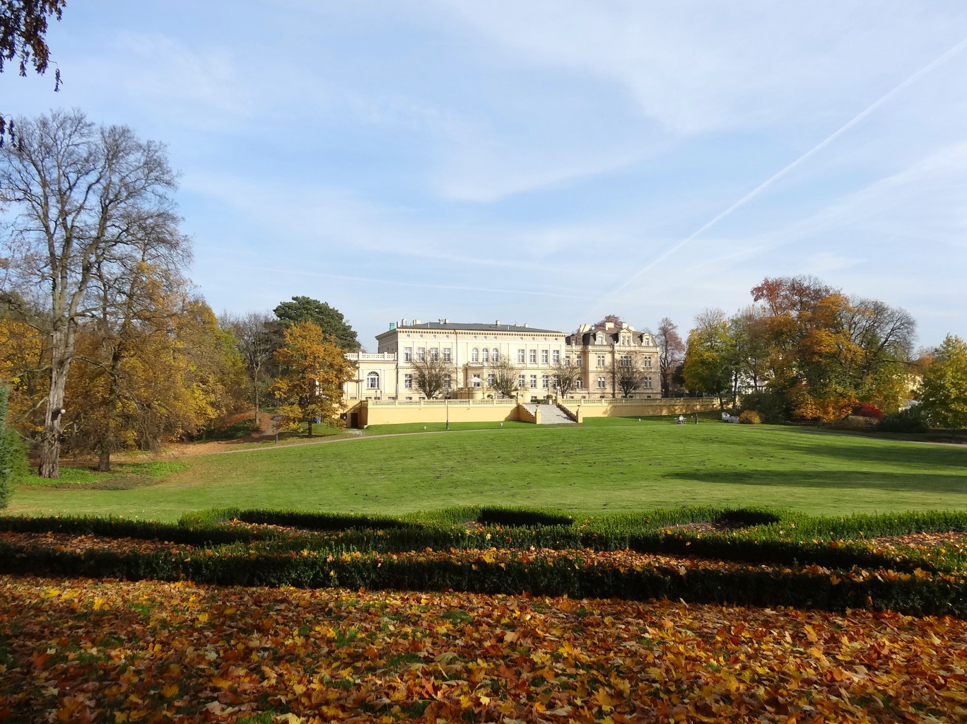 Ostromecko k. Bydgoszczy, pałac, tzw. Nowy, zbud. 1835-1848, 1891